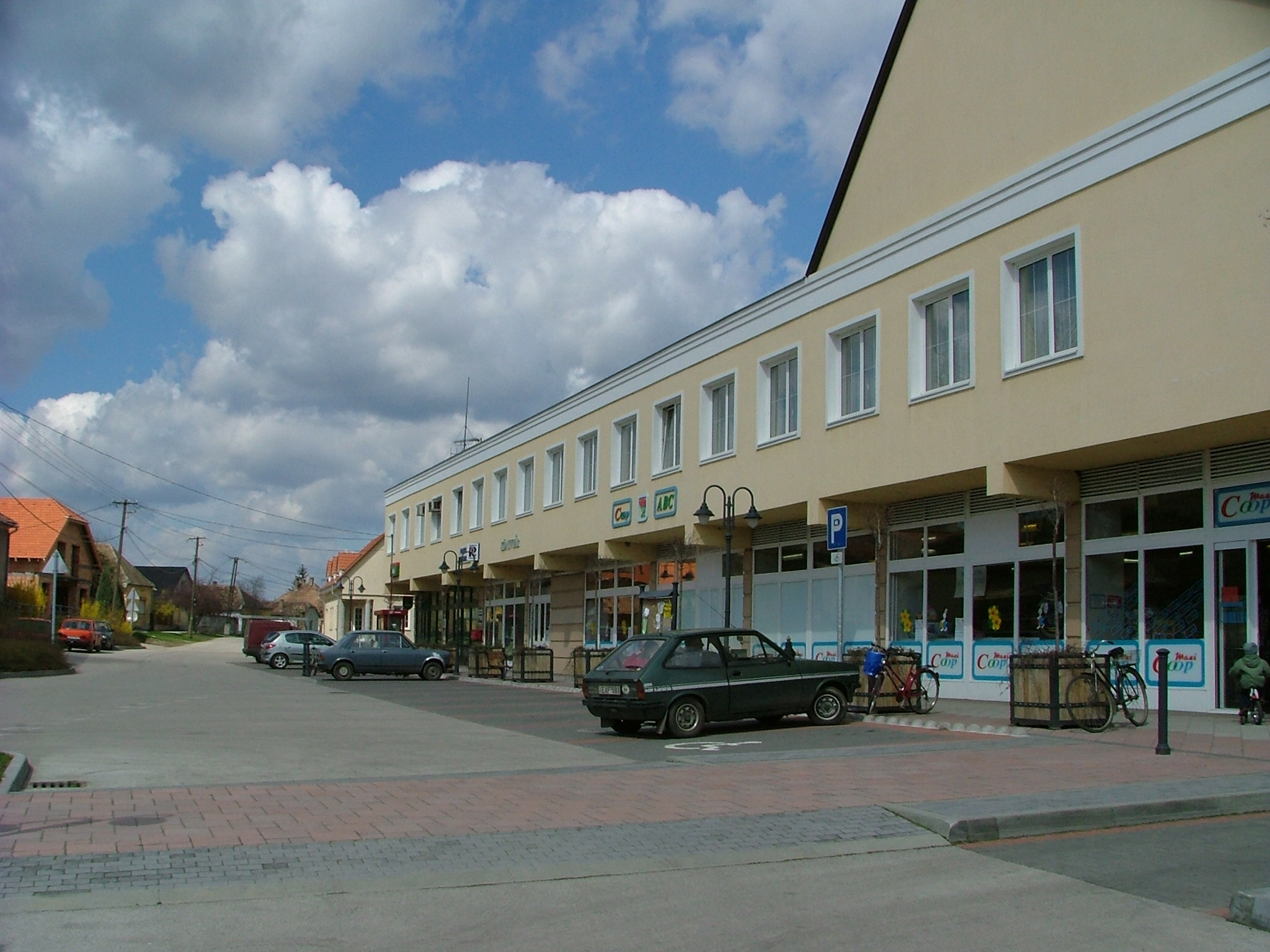 ABC-áruház átvétel után a COOP hálózatban (Nagyigmánd)